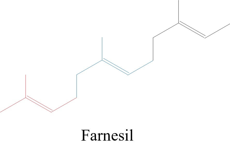 Estrutura química do farnesil, na qual cada unidade de isopreno foi colocada em destaque.